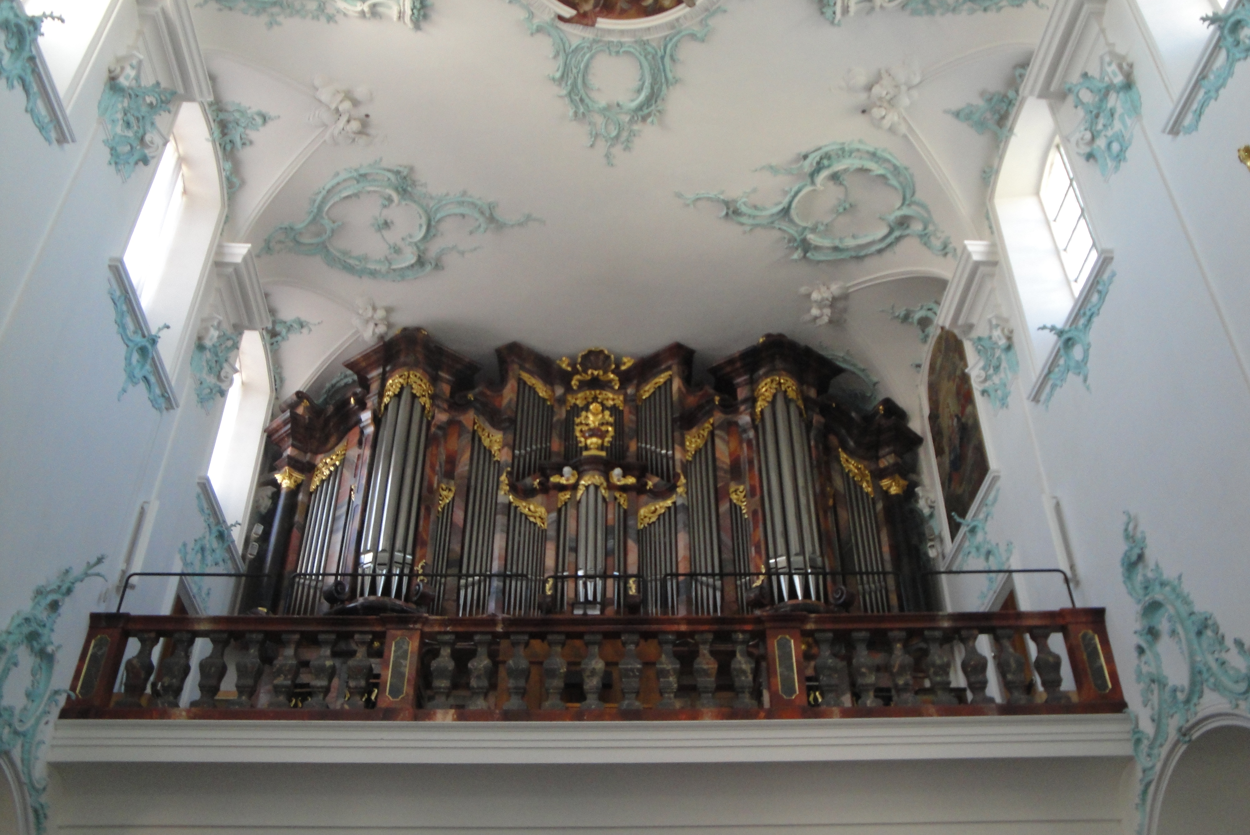 Stiftskirche Beromünster, Orgel